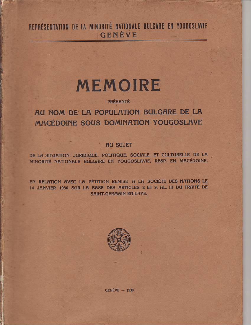 Мемоарът на Шалев, Илиев и Анастасов за права на българите в Югославия до ООН